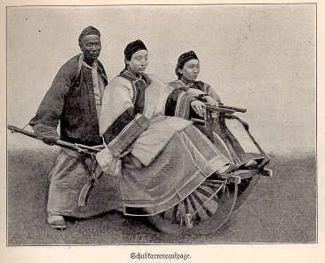 Schubkarre (Original text: Chinesische Schubkarren) Urheberrecht: spätestens 1988 abgelaufen (70 Jahre nach dem Tod des Autors)